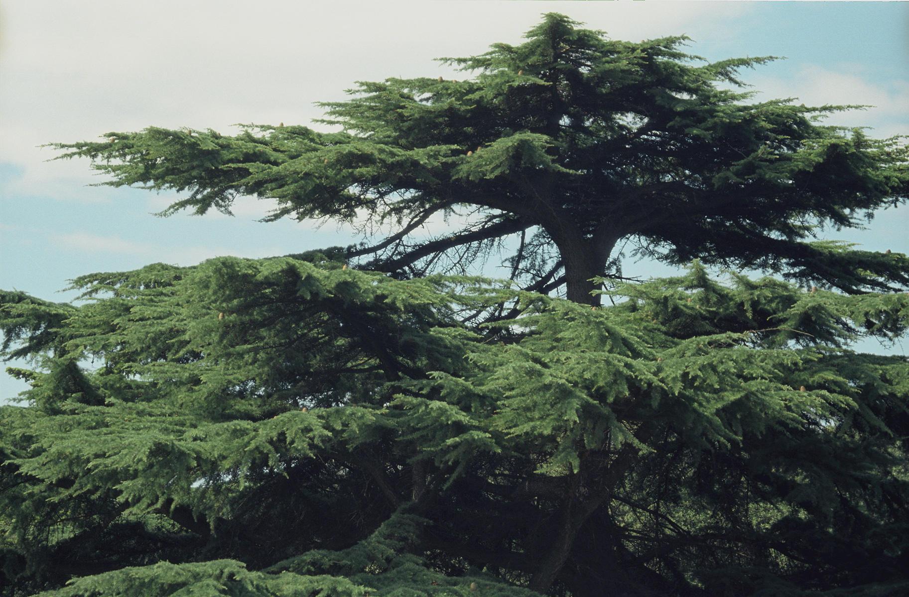 Cedar Cedrus libani tree, Pula, Croatia